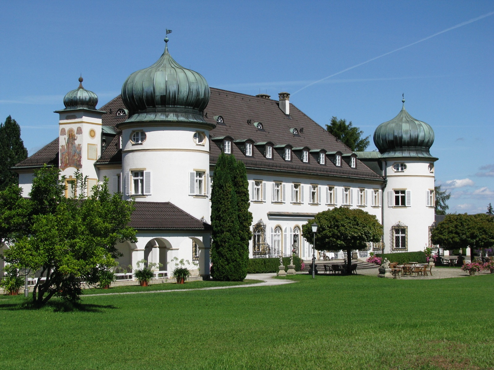 Schloss Höhenried; Walmdachbau mit östlich und westlich angesetzten Rundtürmen, umbautem Gartenhof und Brunnenhof, Neubarockgarten, Südterrasse, 1937/40 in historisierenden Formen This is a photograph of an architectural monument.